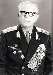 Иван Фёдорович Петров (1897 — 1994) — советский военный и научный деятель